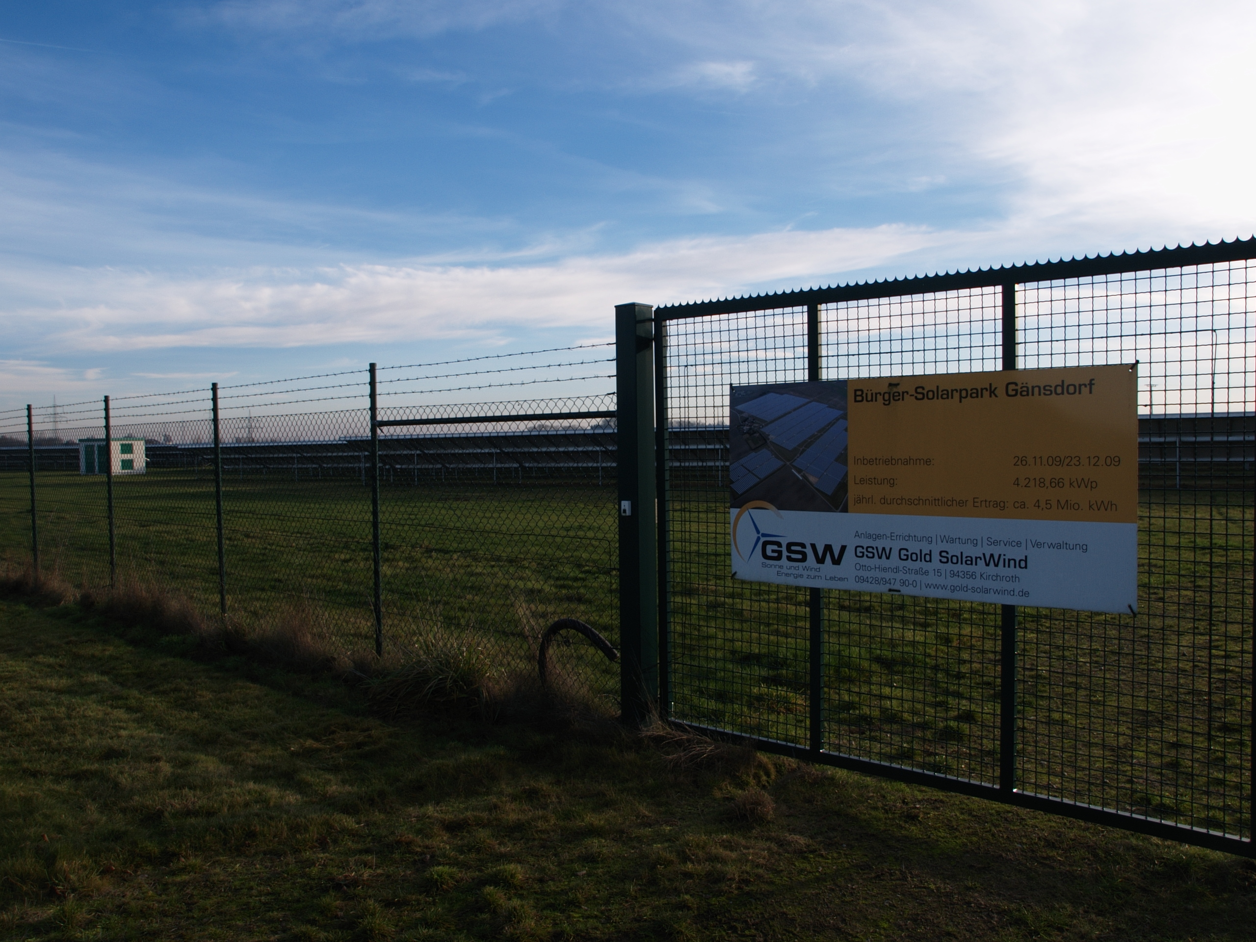 Bürgersolaranlage beim Solarfeld Gänsdorf